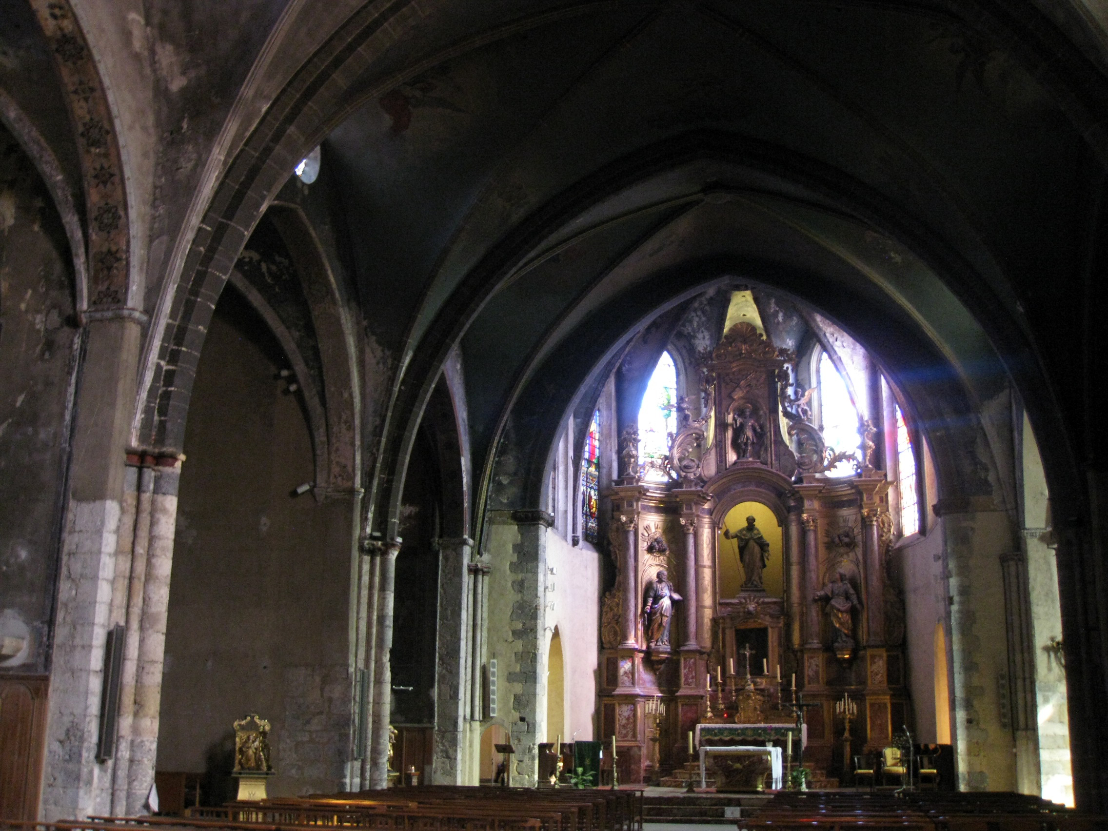 Església de Sant Jaume (Perpinyà), vista de la nau, amb el presbiteri al fons